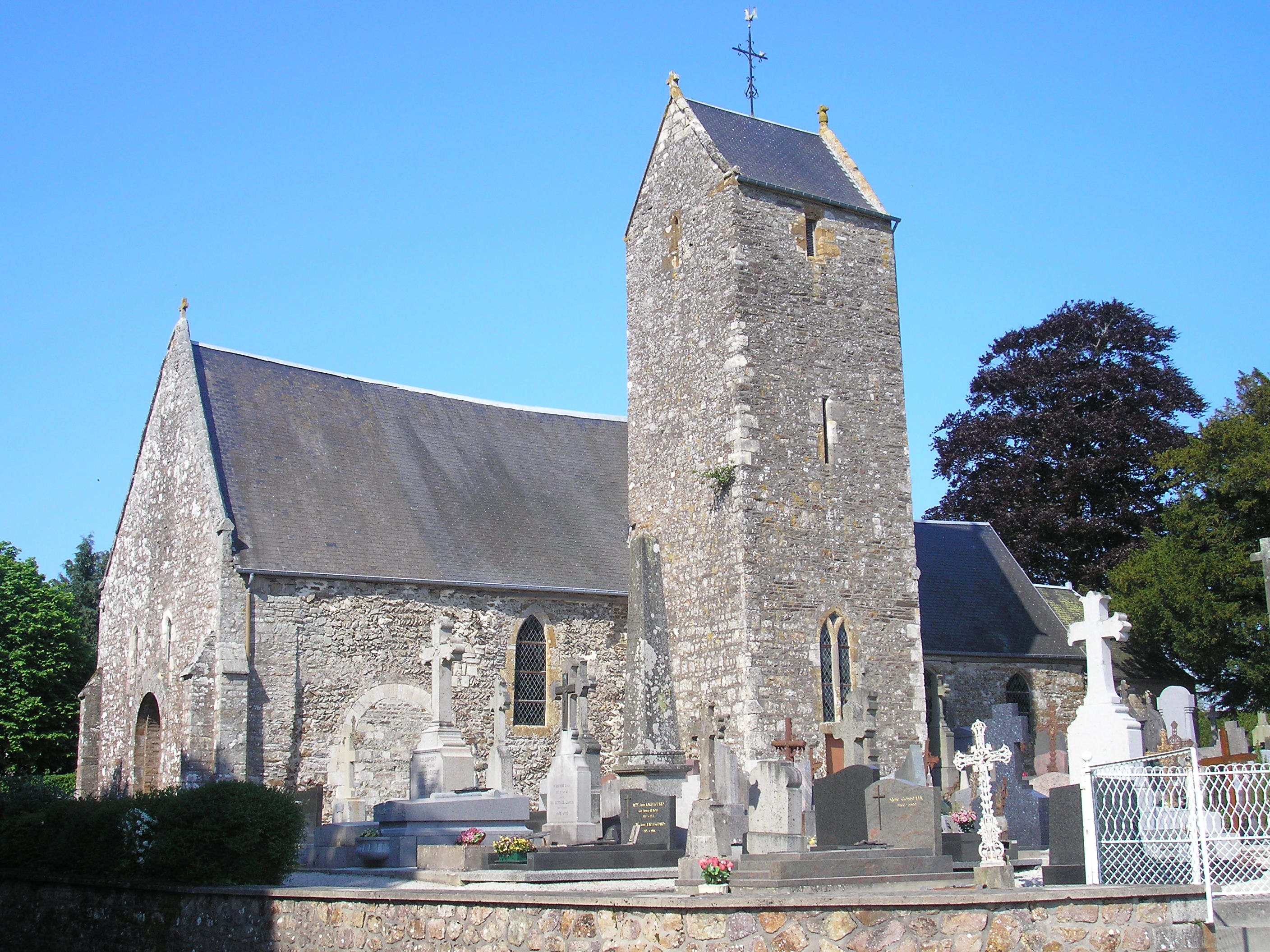 Lénault (Normandie, France). L'église Notre-Dame construite en schiste, grès et granit. Les 2 murs latéraux de la nef sont en arête-de-poisson